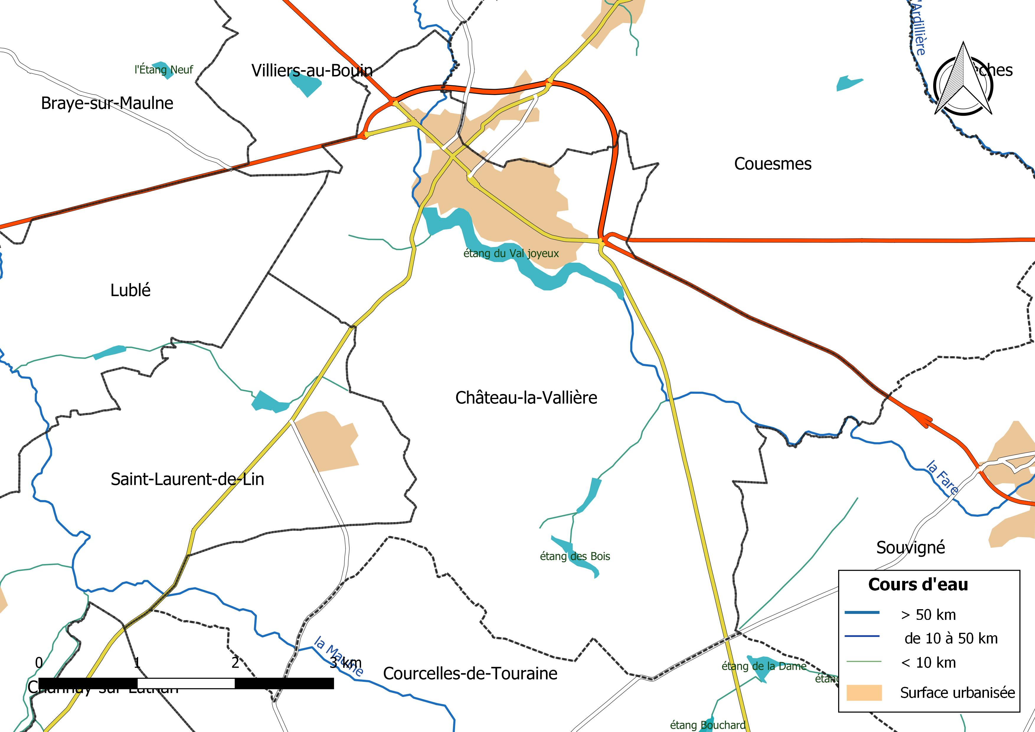 Carte du réseau hydrographique de la commune de Château-la-Vallière (France).